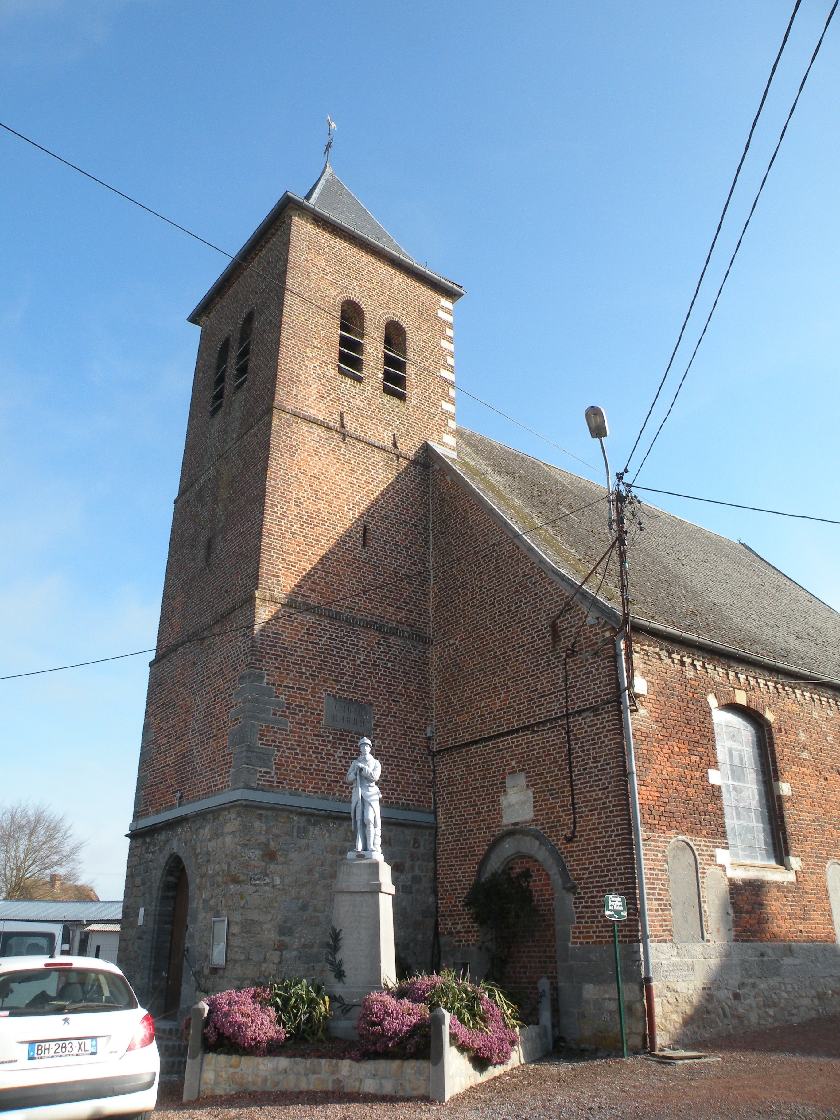 église de Bry (Nord)